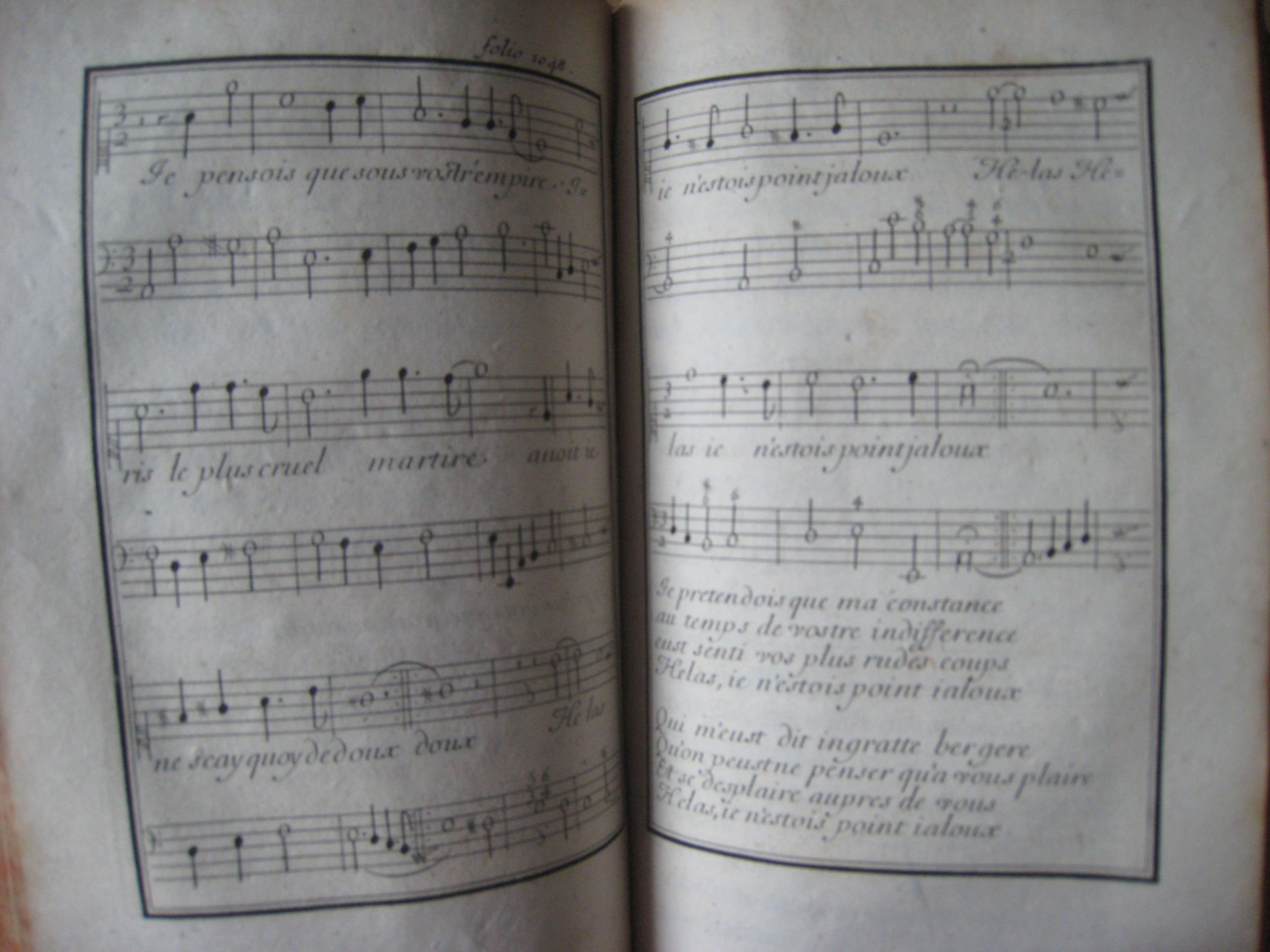 Noter til en sang i romanen Clelie histoire romaine.